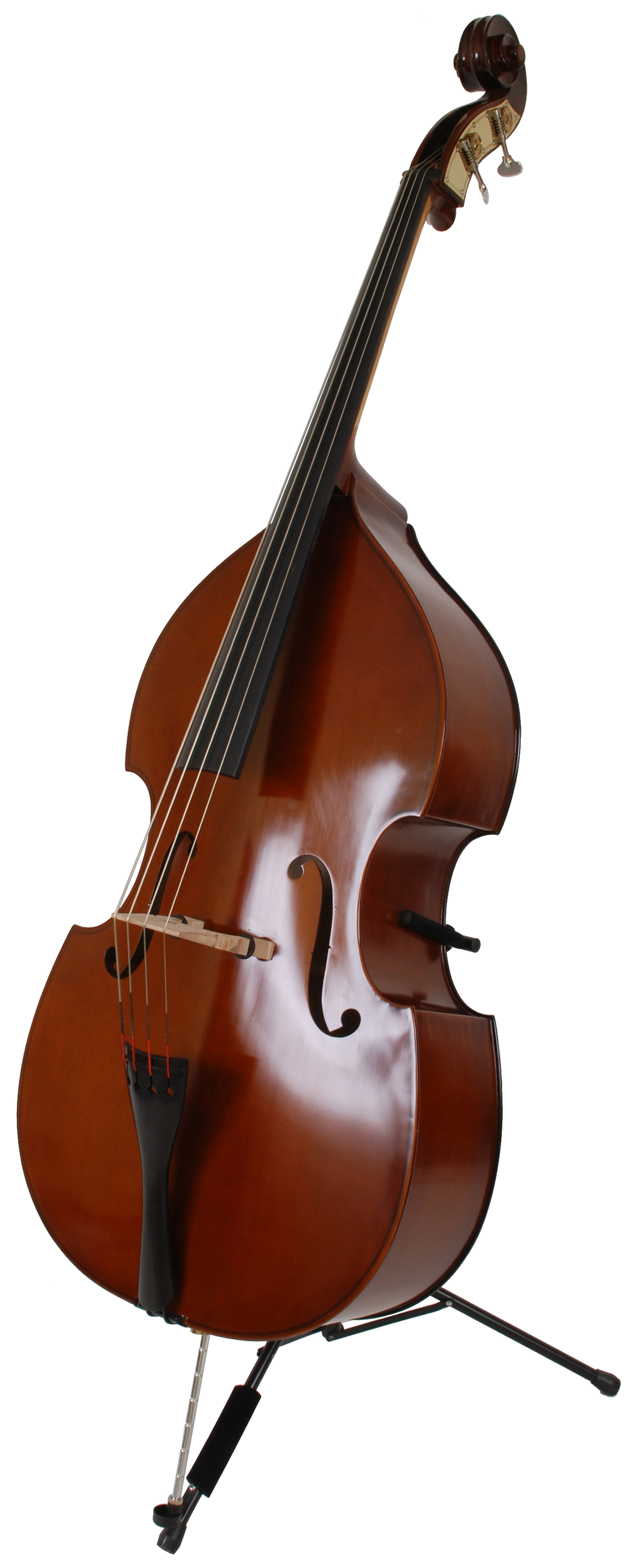 Kontrabas AS-060-B-3/4 firmy Hofner